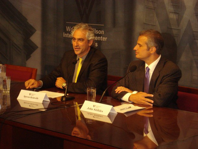 Στα πλαίσια της επίσημης επίσκεψης στο Woodrow Wilson Centre Ο Υφυπουργός Εξωτερικών κ. Σπύρος Κουβέλης πραγματοποίησε επίσημη επίσκεψη στην Ουάσιγκτον (7- 9 Ιουλίου 2010), στη διάρκεια της οποίας είχε σειρά συναντήσεων με ομολόγους του και εμπλεκόμενους φορείς σε θέματα διμερούς οικονομικής και εμπορικής συνεργασίας. Φωτογραφία: Υπουργείο Εξωτερικών.